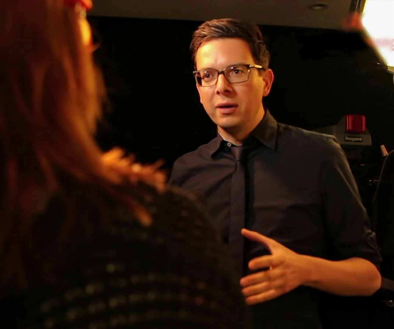 Beim ZDF hatten Teilnehmer der JMT die Chance ihre eigene Studiosendung aufzunehmen. Angeleitet wurden sie durch den Moderator Wolf-Christian Ulrich. Im Interview erklärt wie wichtig Partizipation und aktives Engagement in Gesellschaft und im Journalismus ist. Die Jugendmedientage sieht er als spannende Gelegenheit in die Welt der Medien zu schnuppern. Beitrag: Inka Philipp und Florian Schwarz